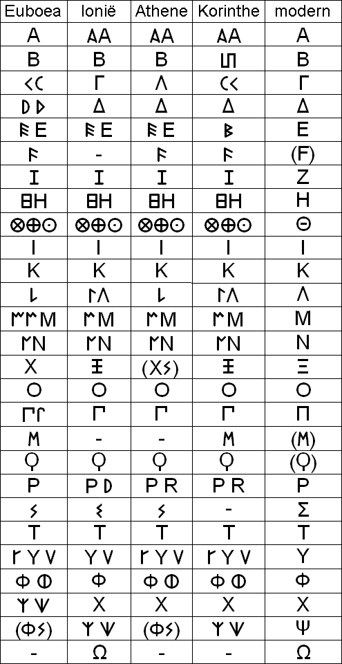 Oude epichorische varianten van het Griekse alfabet van Euboea, Ionië, Athen en Korinthe (samen met het moderne Griekse alfabet)